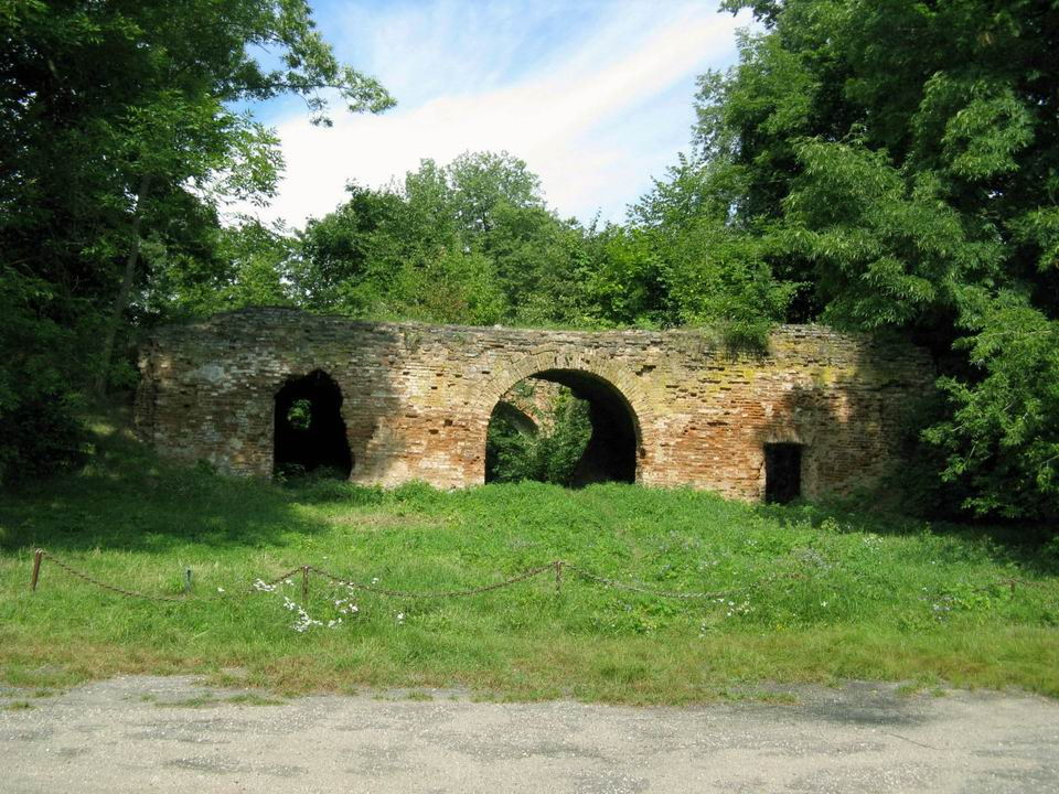 Беларуская (тарашкевіца): Высокае